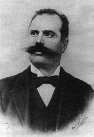 Giovanni Montano, medico e scienziato italiano, scopritore e studioso del Favismo